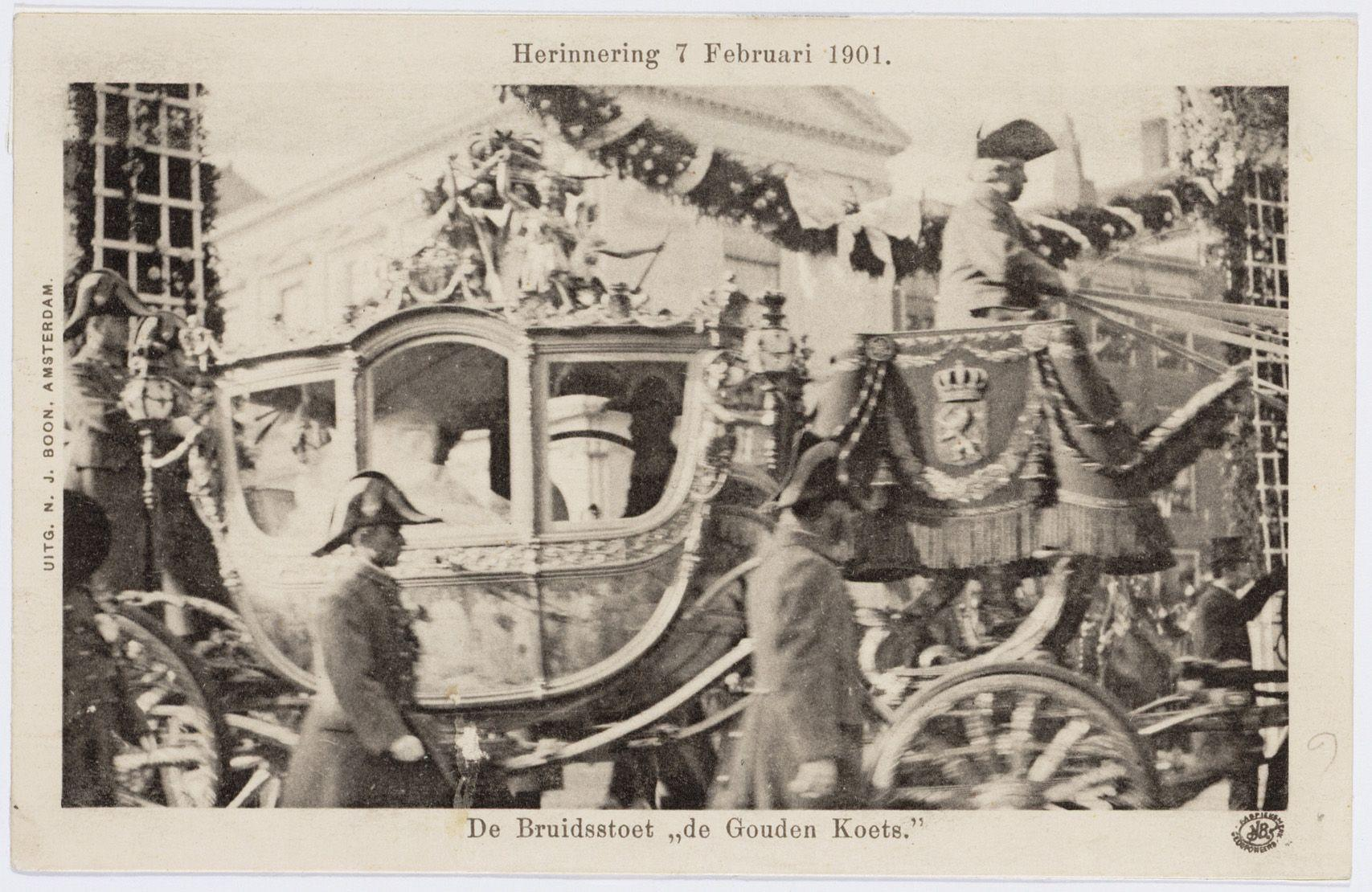 Beschrijving Huwelijksinzegening van H. M. de Koningin en Z. K. H. Prins HendrikGouden koets voor Paleis Noordeinde in Den HaagDocumenttype prentVervaardiger Boon, N.J. (uitgever)Collectie Collectie Stadsarchief Amsterdam: los beeldmateriaalDatering 6 maart 1901Inventarissen 010194002348 Generated with Dememorixer